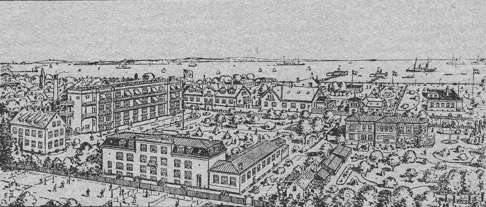 Skodsborg Badesanatorium 1910.